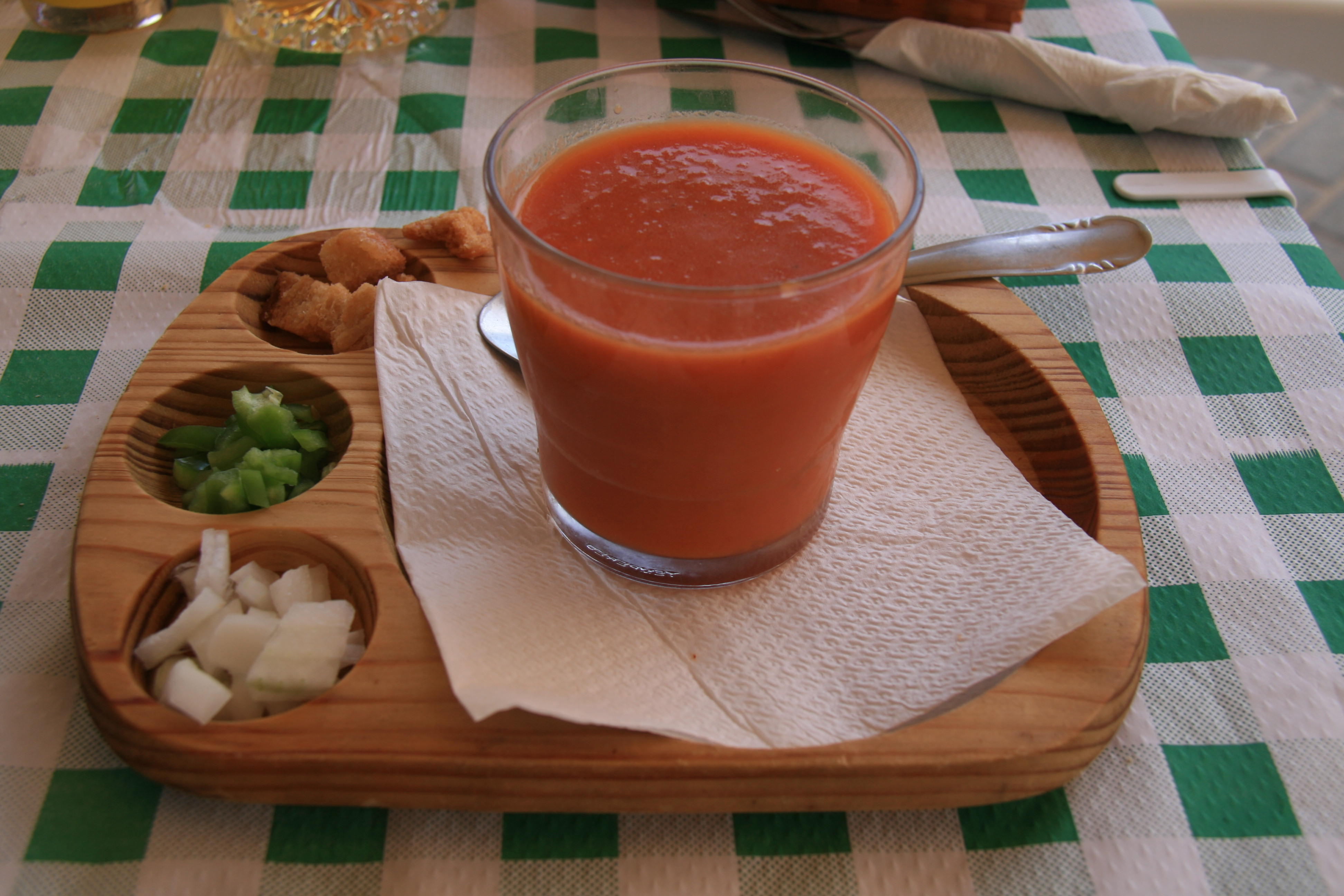 Gazpacho